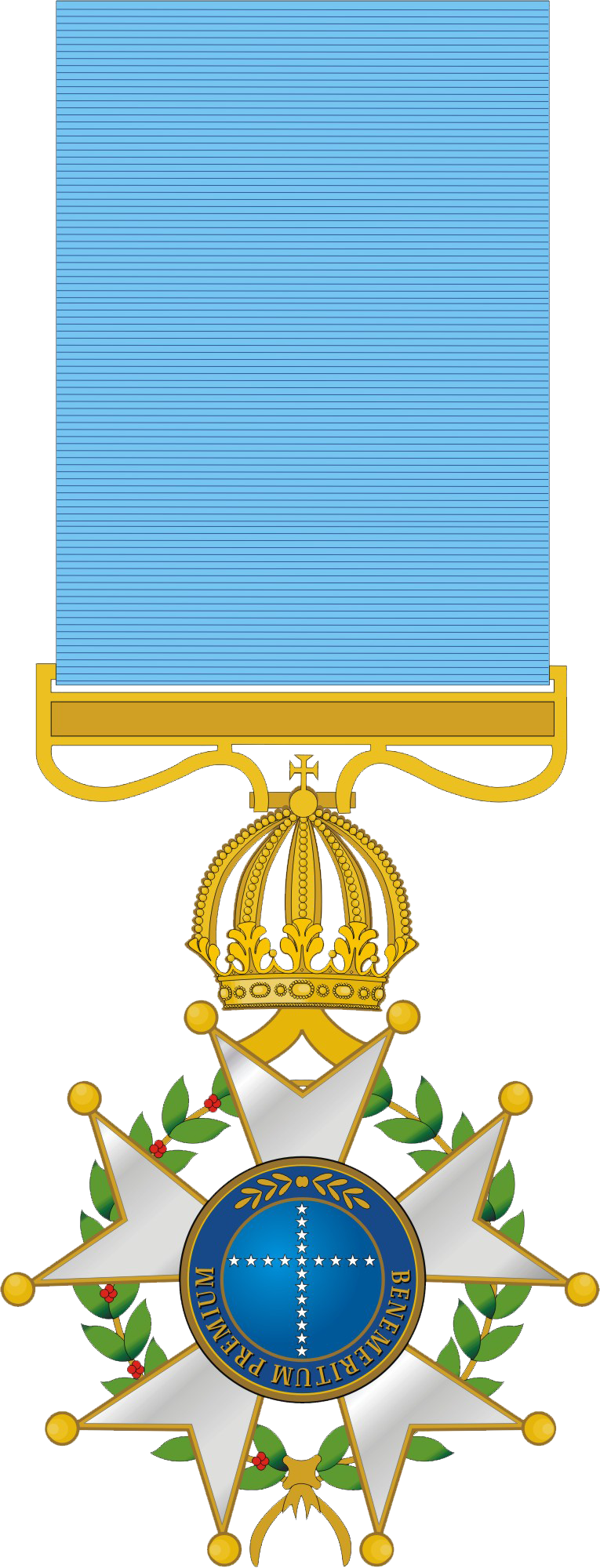 Condecoração da Imperial Ordem do Cruzeiro - Grau: Oficial